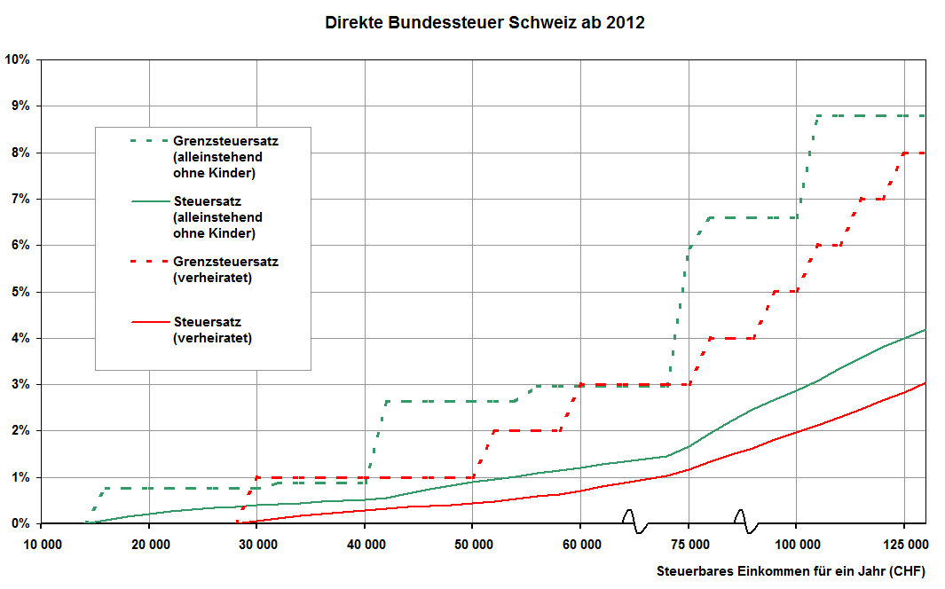 Die Grafik zeigt den Verlauf des Grenzsteuersatzes (gestrichelte Linien) und des Durchschnittsteuersatzes (durchgezogene Linien) in Abhängigkeit vom steuerbaren Einkommen bis zu 130 000 CHF. Die Skalierung ist für Einkommen über 60 000 CHF gestaucht.